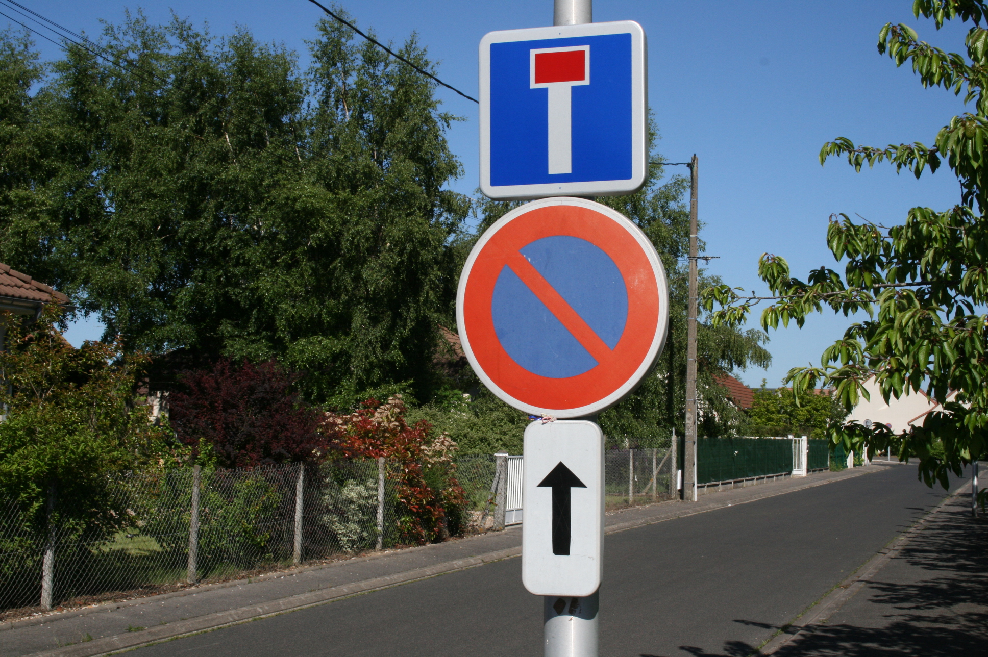 Panneau B6a1. Stationnement interdit (France) - accompagné d'un panonceau M8a indiquant que l'interdiction commence au droit du panneau.